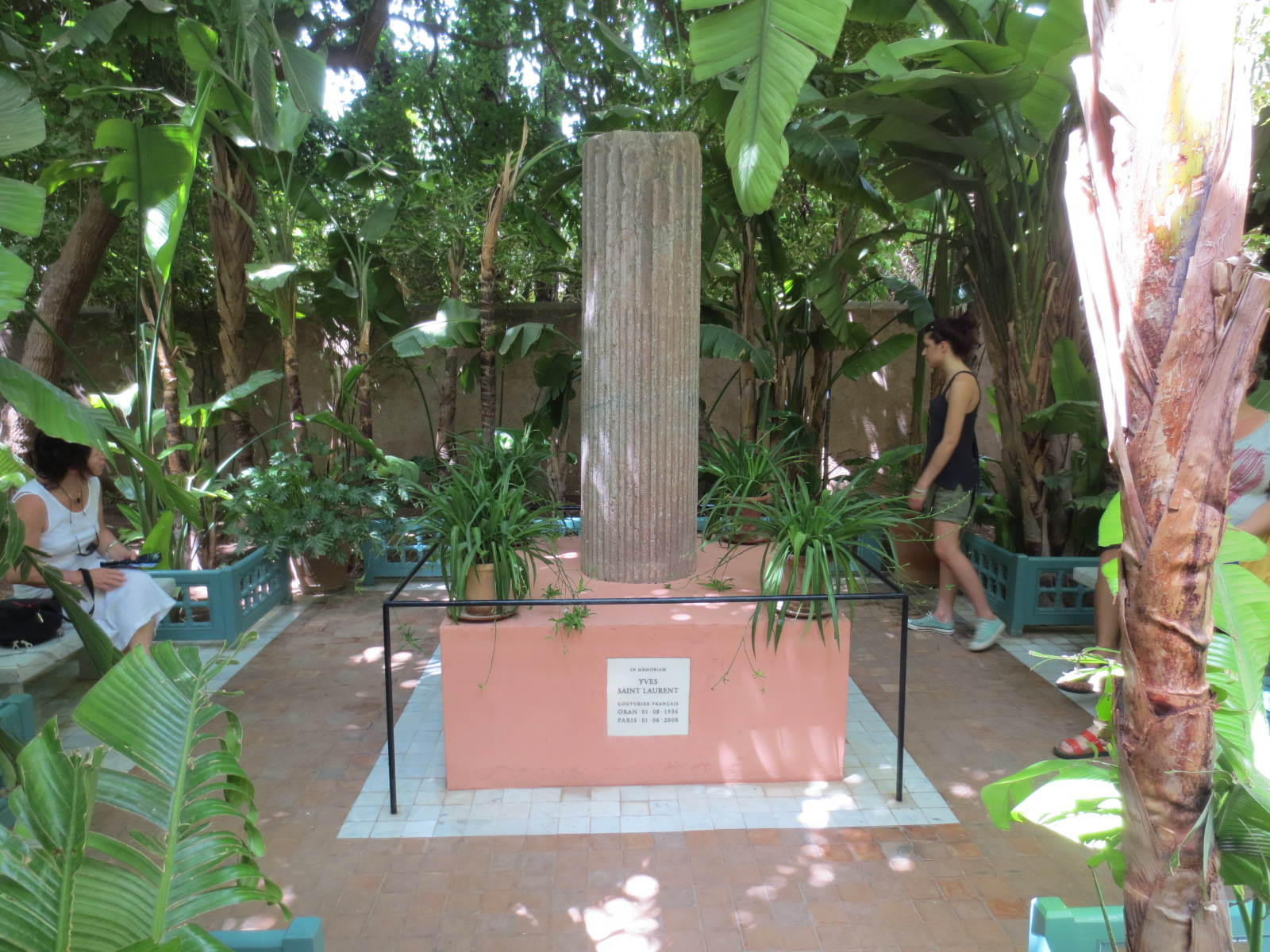 Mémorial Yves Saint Laurent du Jardin Majorelle de Marrakech au Maroc